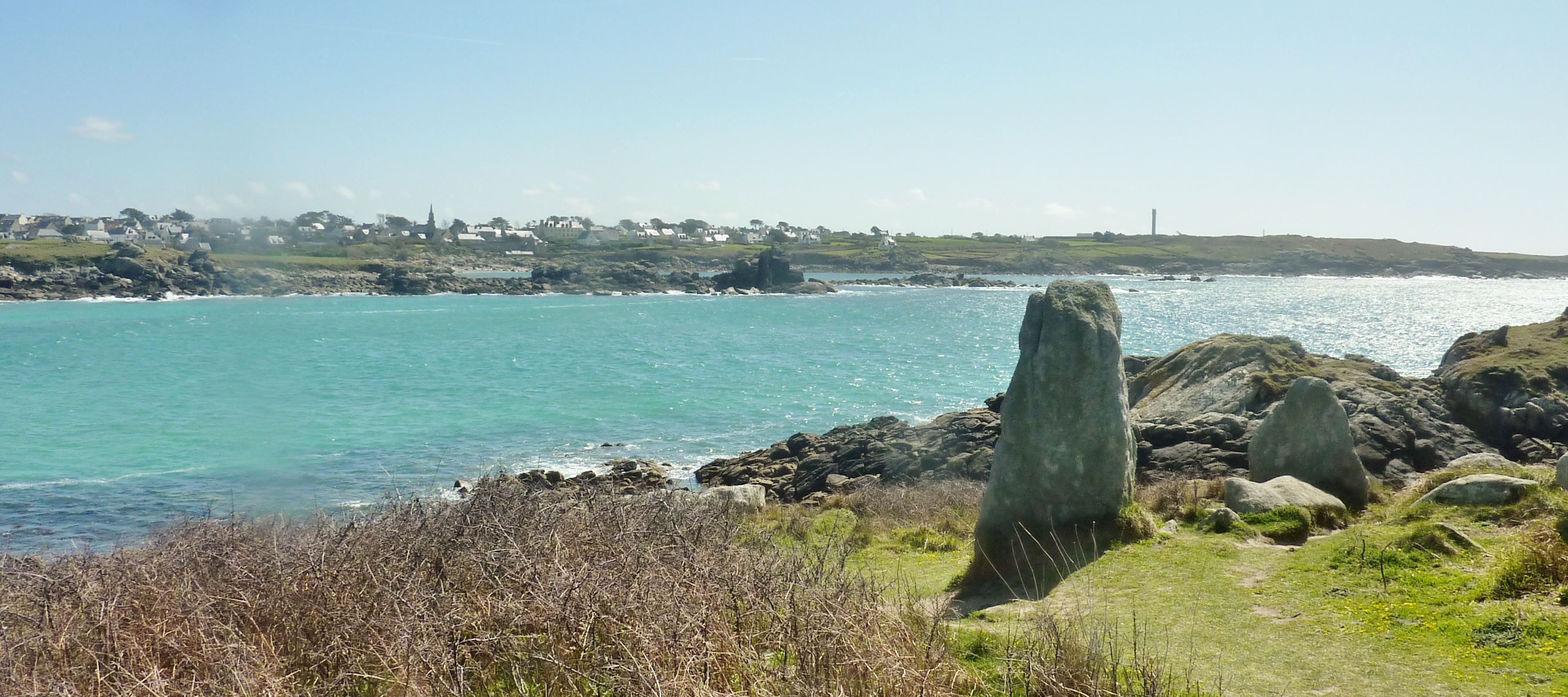 Porspoder vu depuis la presqu'île Saint-Laurent ; au premier plan le cromlech de la presqu'île Saint-Laurent.